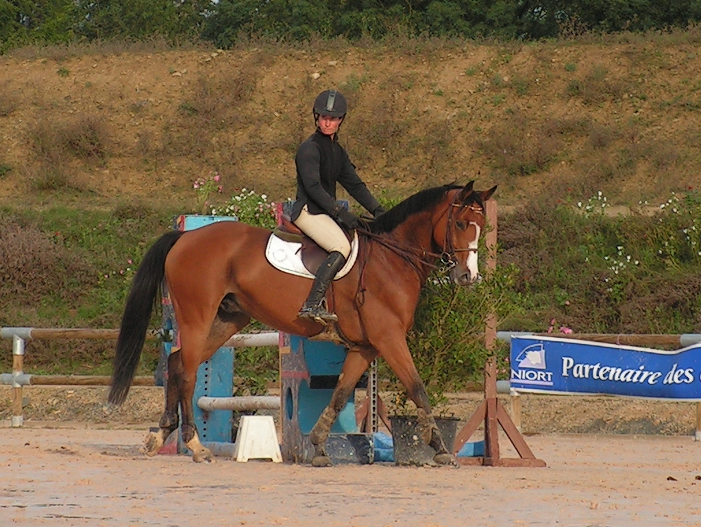 Concentration avant le départ Cheval : Kalife des Cabanes Cavalier : Stephanie Bremand Date, lieu : Septembre 2006 à Niort Auteur : Karlyne